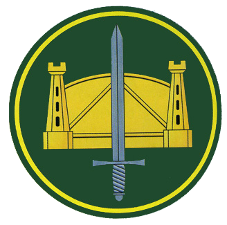 Нарукавная нашивка